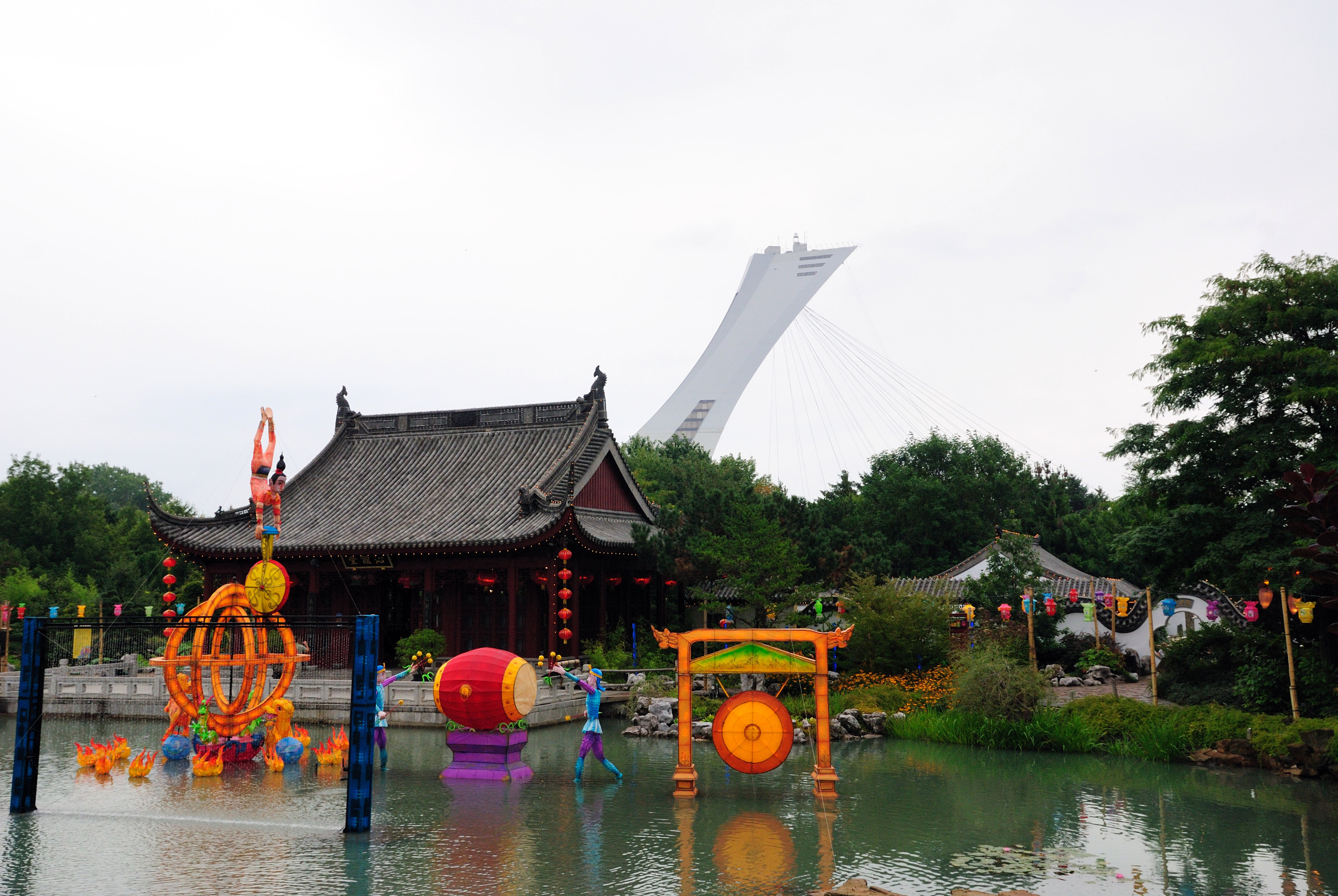 Montreal: Chinesischer Garten im Botanischen Garten, im Hintergrund der Olympiaturm